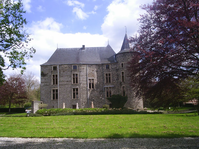 Kasteel Wittem, foto eigen werk